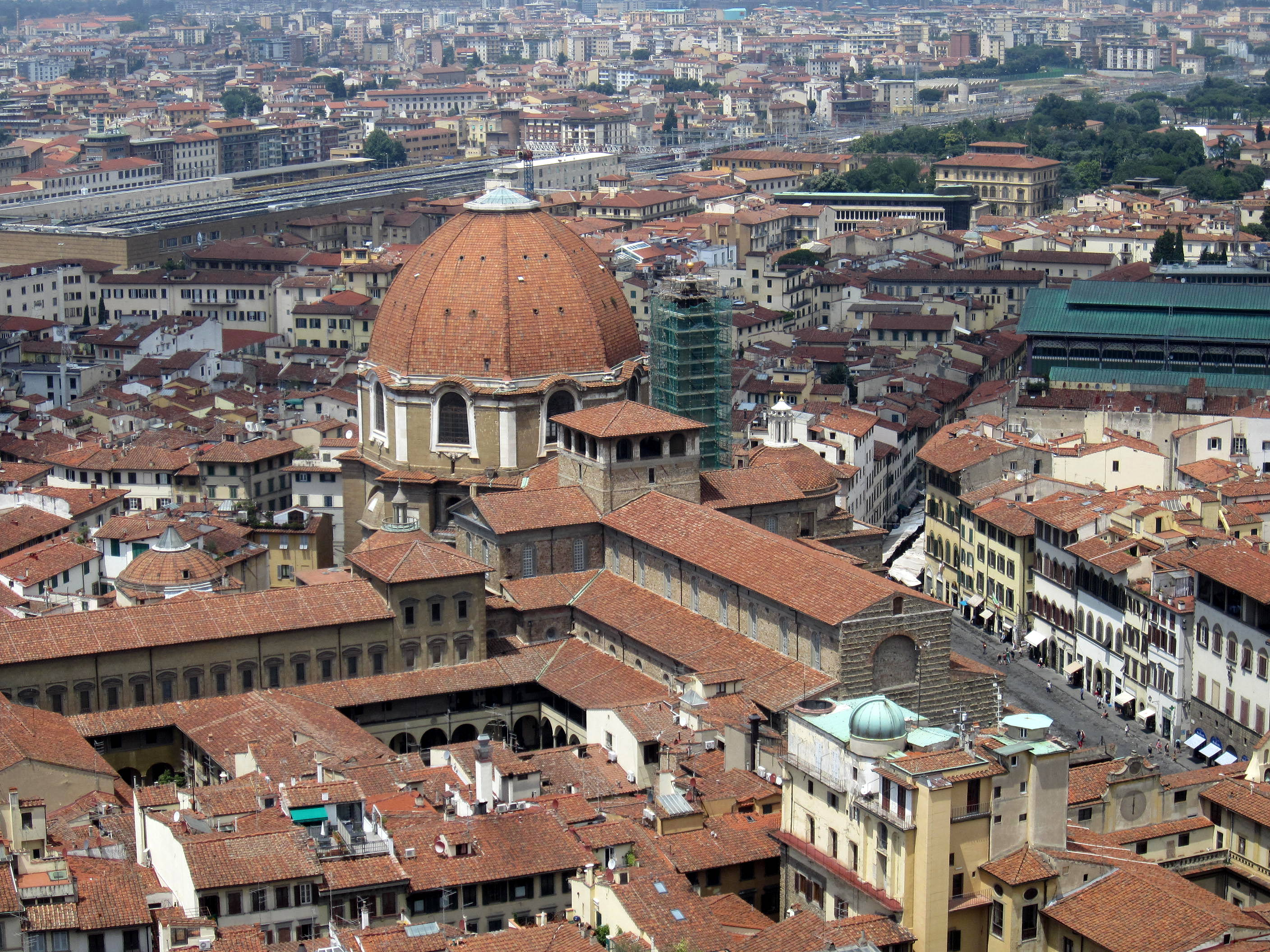 Chiesa di San Lorenzo dalla cupola del Duomo